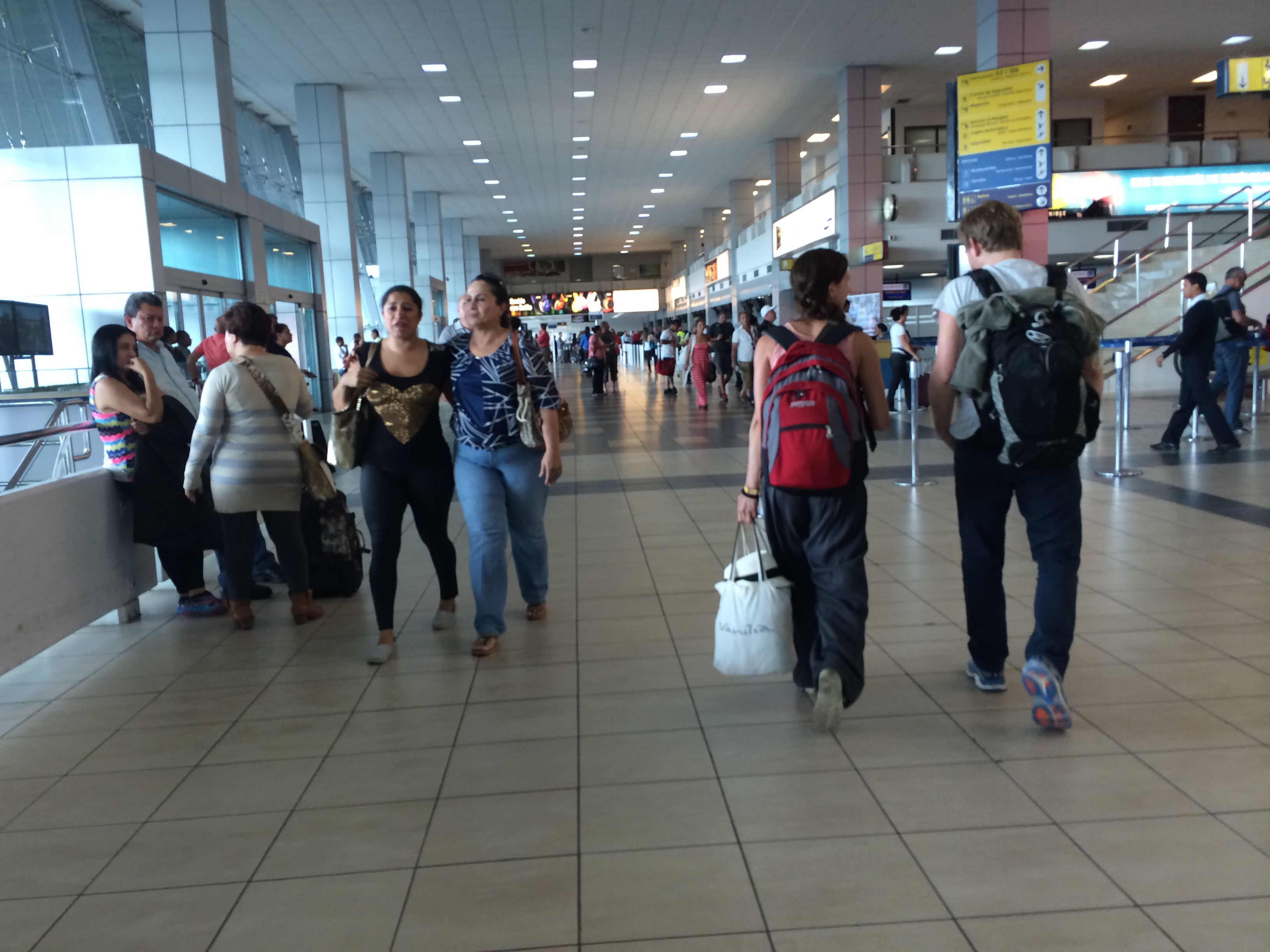 Interior del Aeropuerto Internacional de Panamá.